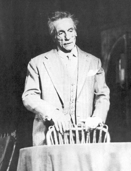 Foto di scena rappresentazione anno 1960. Da me rielaborata e modificata.